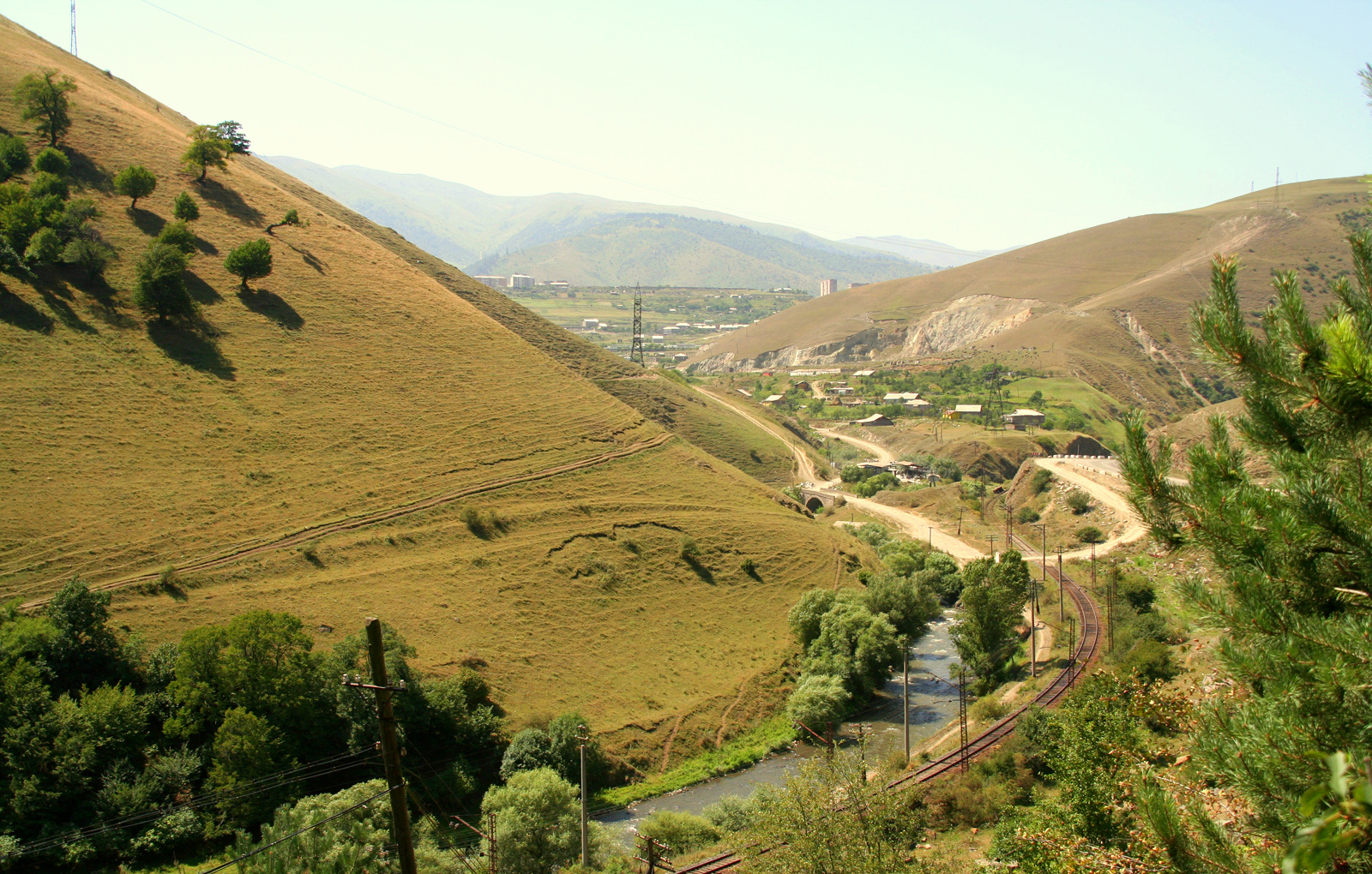 Environs de Vanadzor (rivière Pambak)